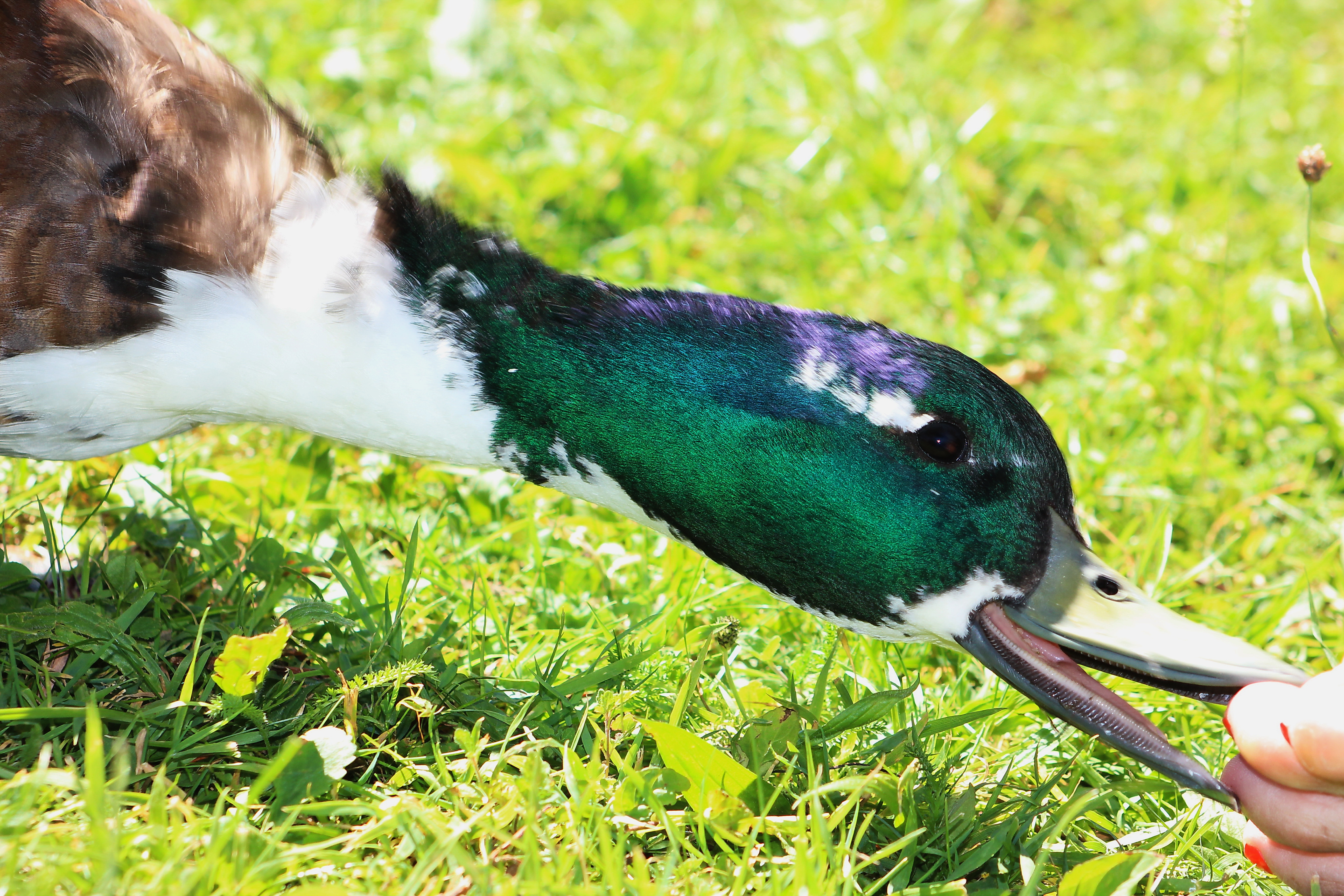 Stockente beißt in einen Zeh